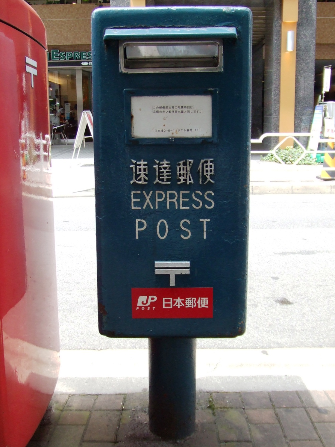 速達郵便専用郵便ポスト